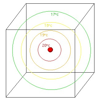 Illustration pour l'assimilation de données (Wikipedia France).